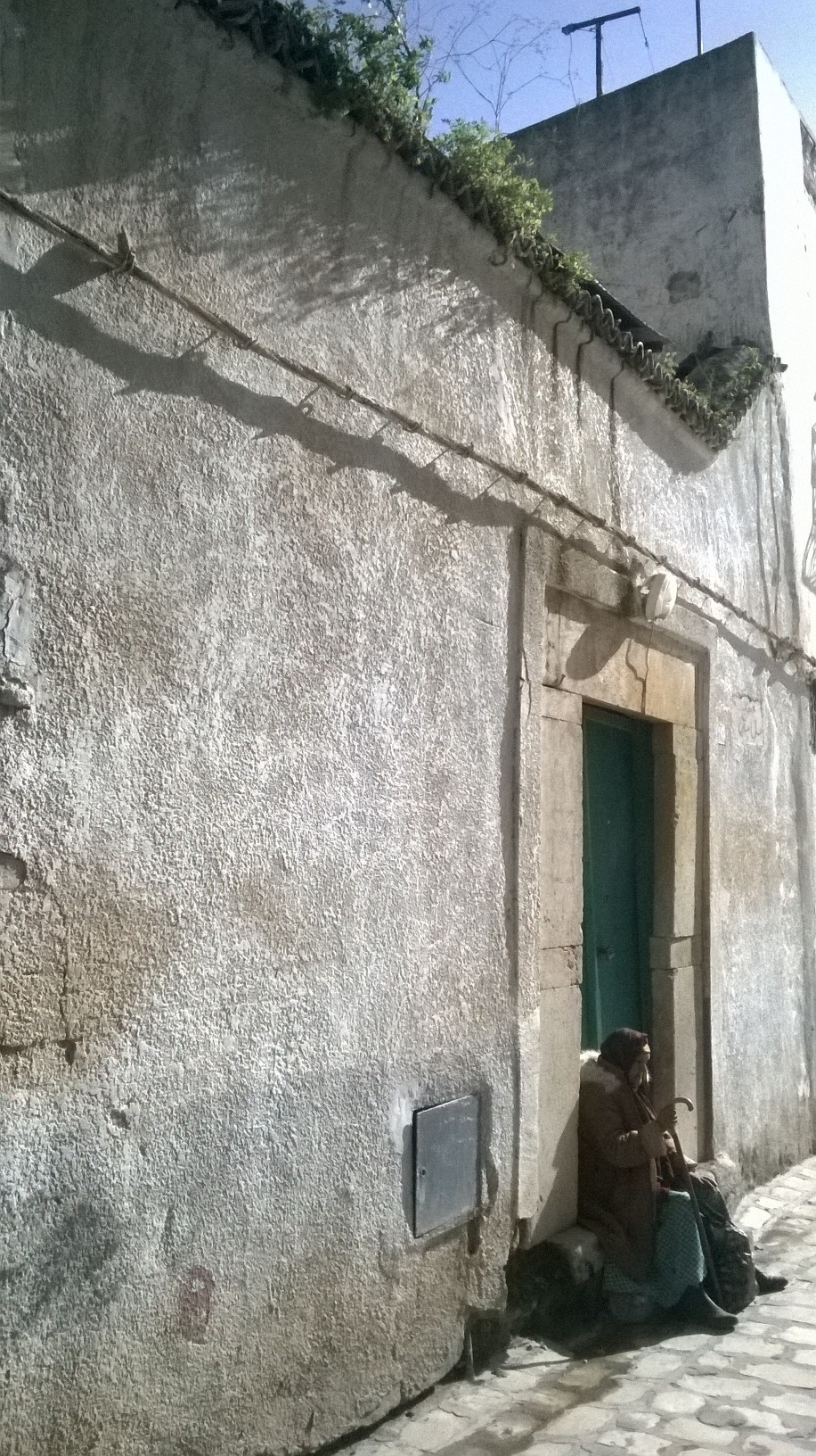 La médina de Tunis مدينة تونس العتيقة